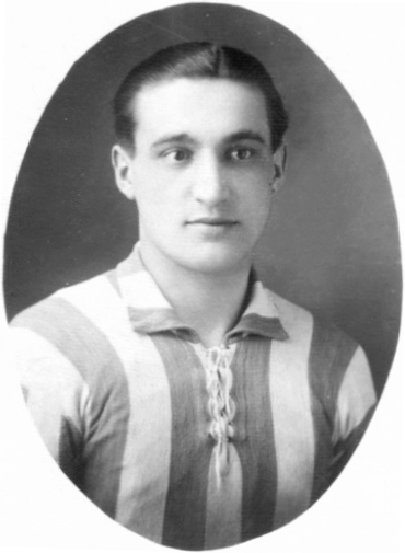 Ștefan Dobay